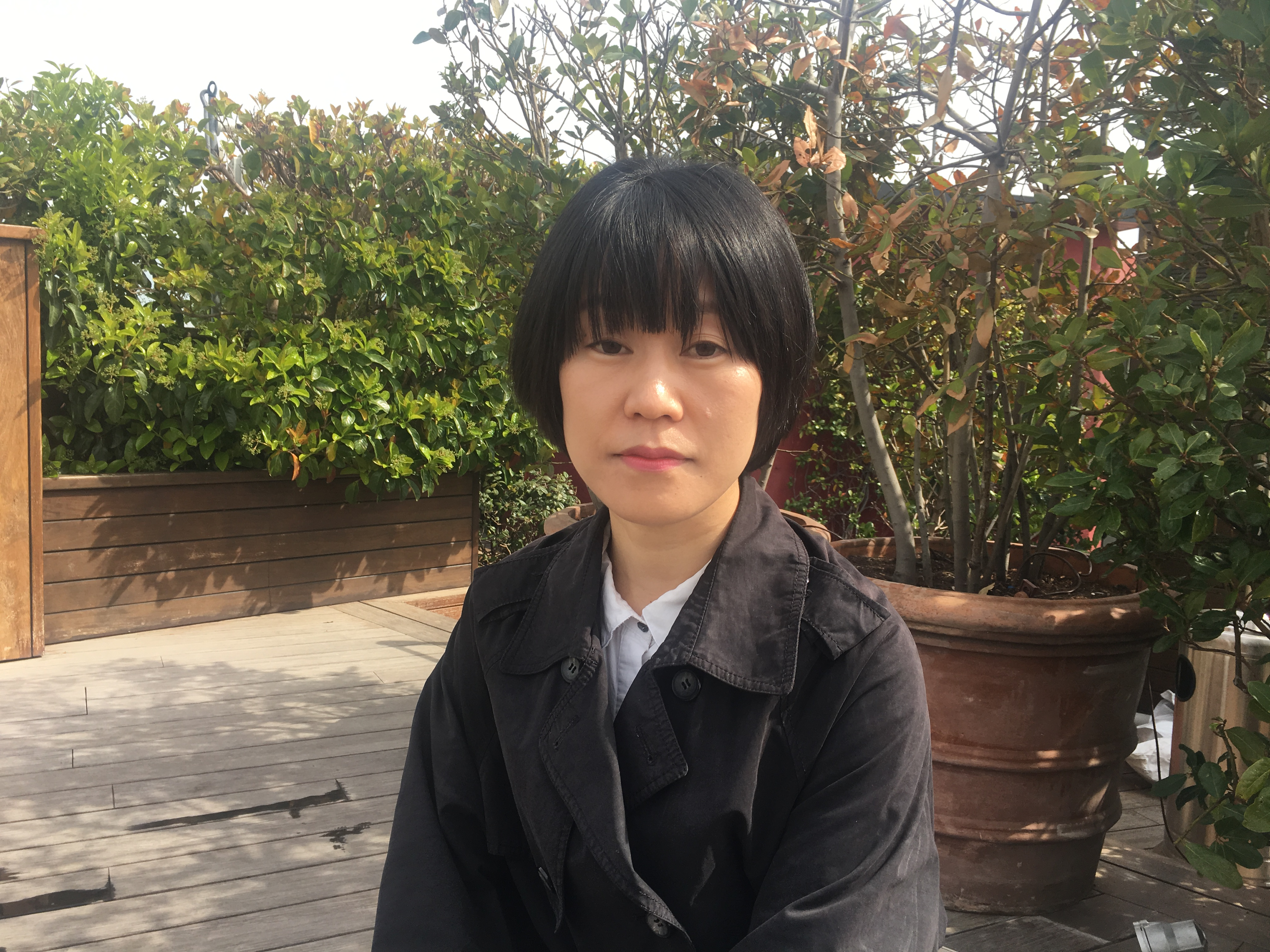 Kim Ae-ran a Barcelona